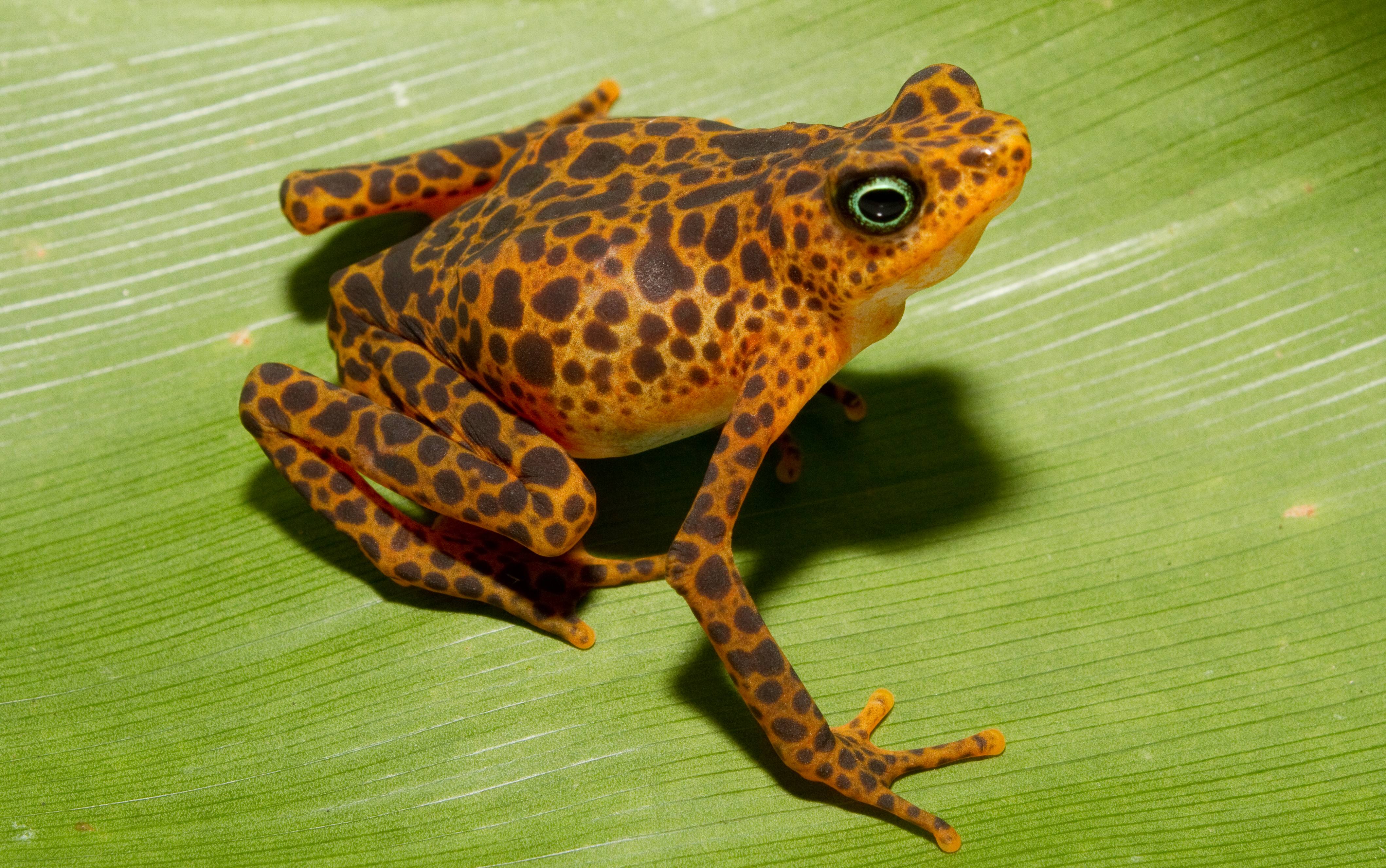 Atelopus certus